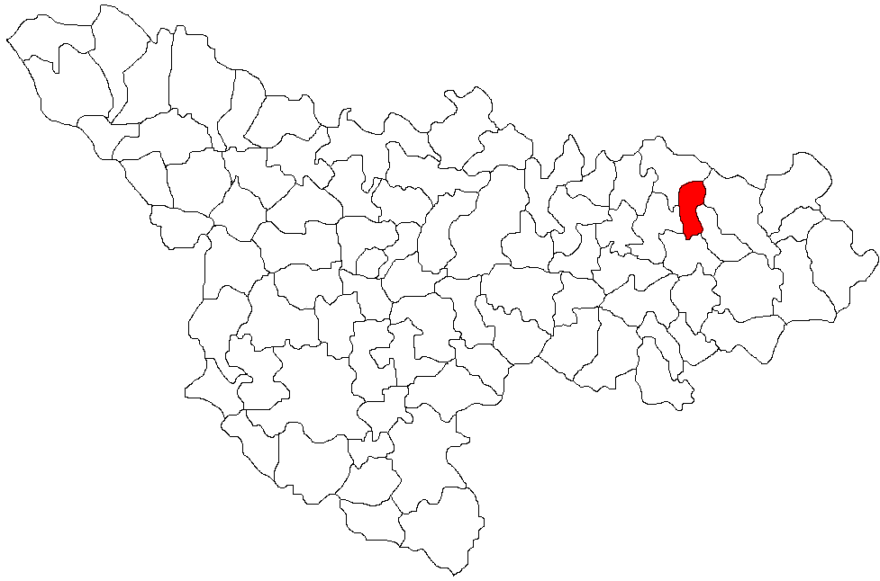 Categorie:Hărţi ale judeţului Timiş